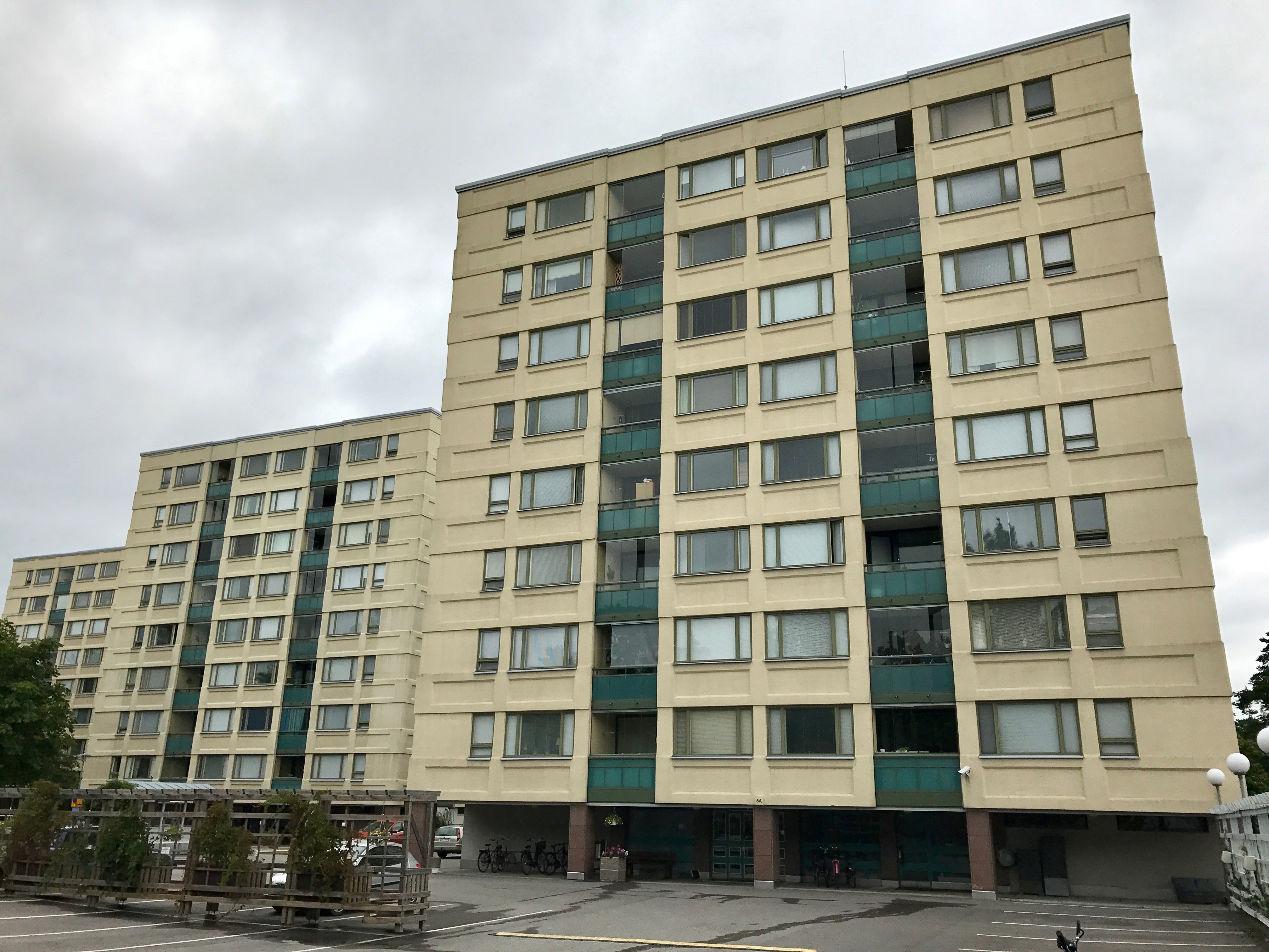 Asunto Oy Sulkapolku 6 hallitsema kerrostalo Helsingin Pitäjänmäellä.